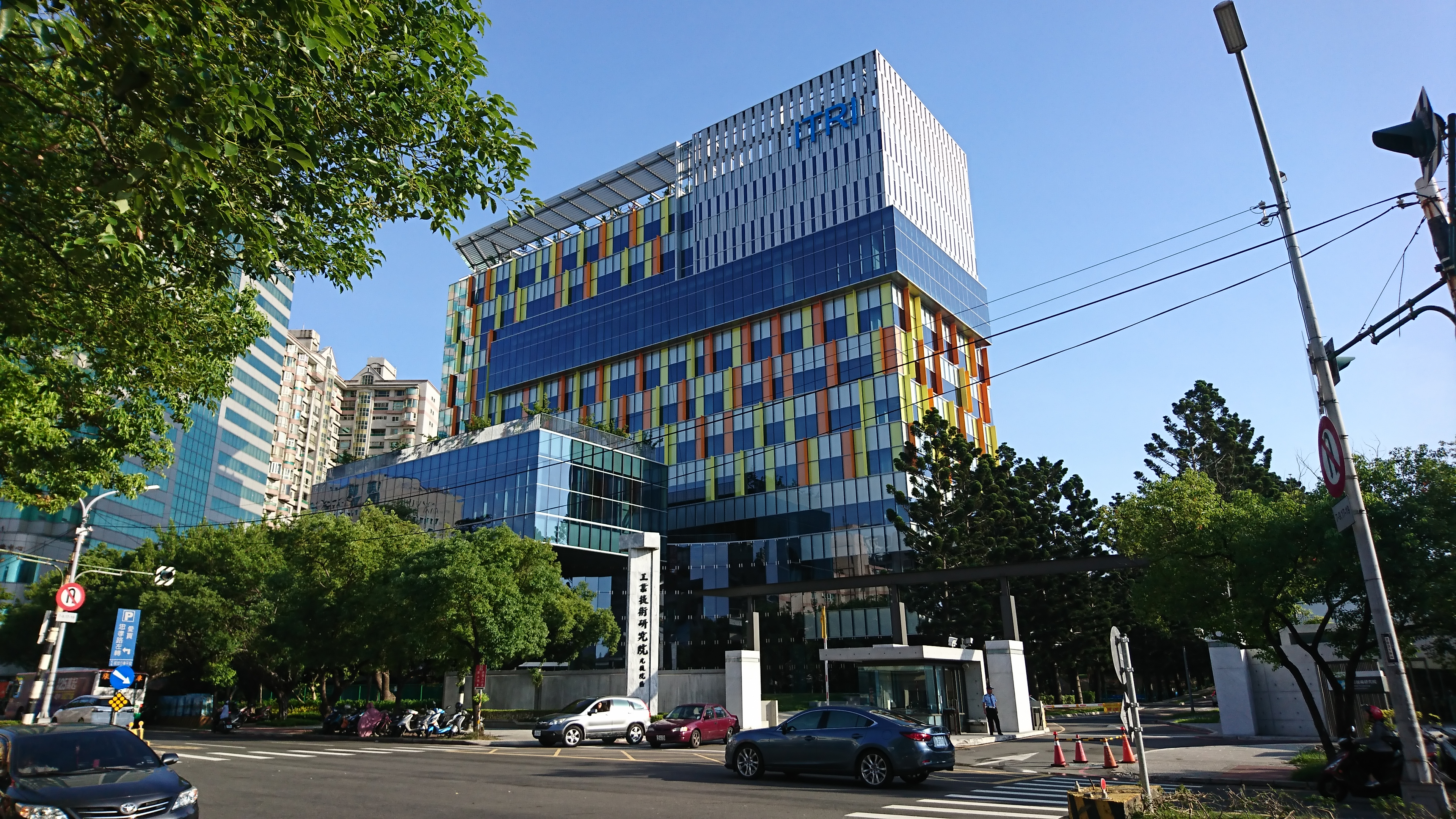 中文（台灣）: 工業技術研究院光復院區創新園區第一期大樓。